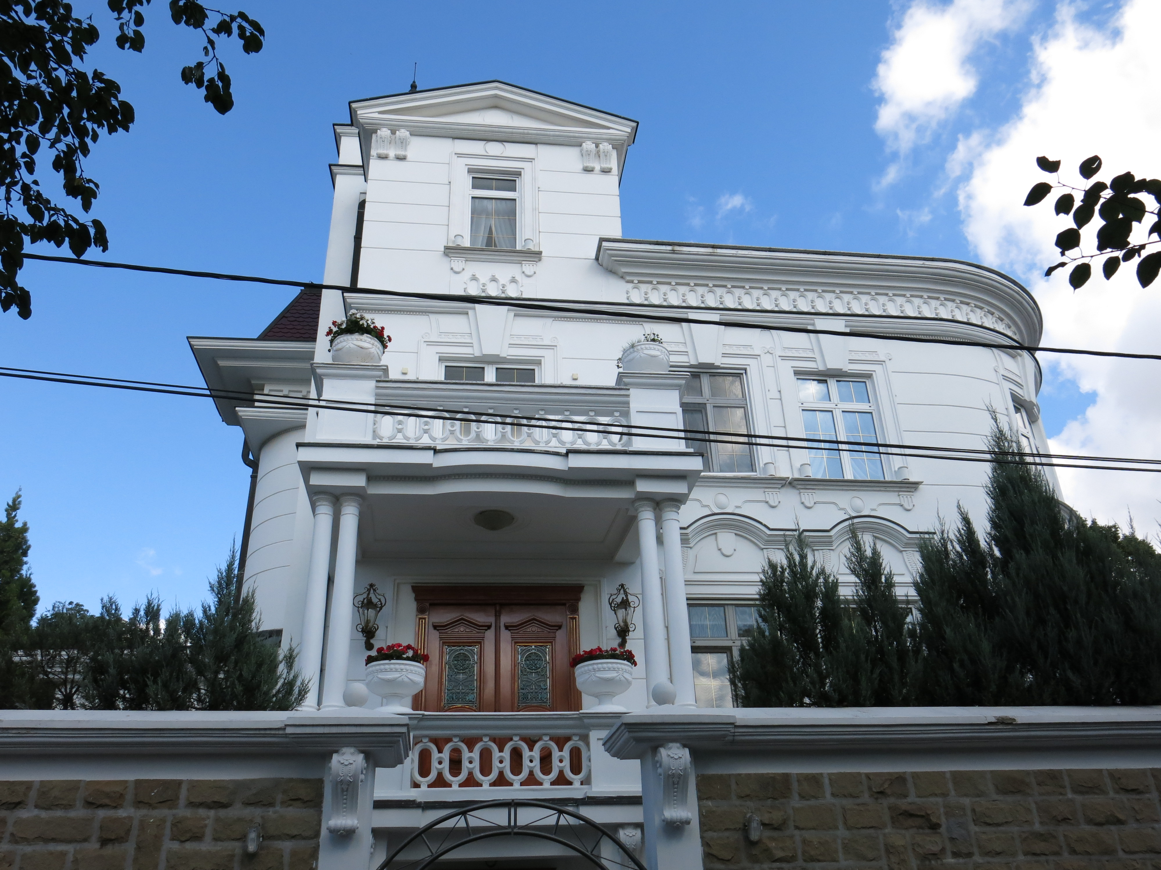 Вила Олге Мос